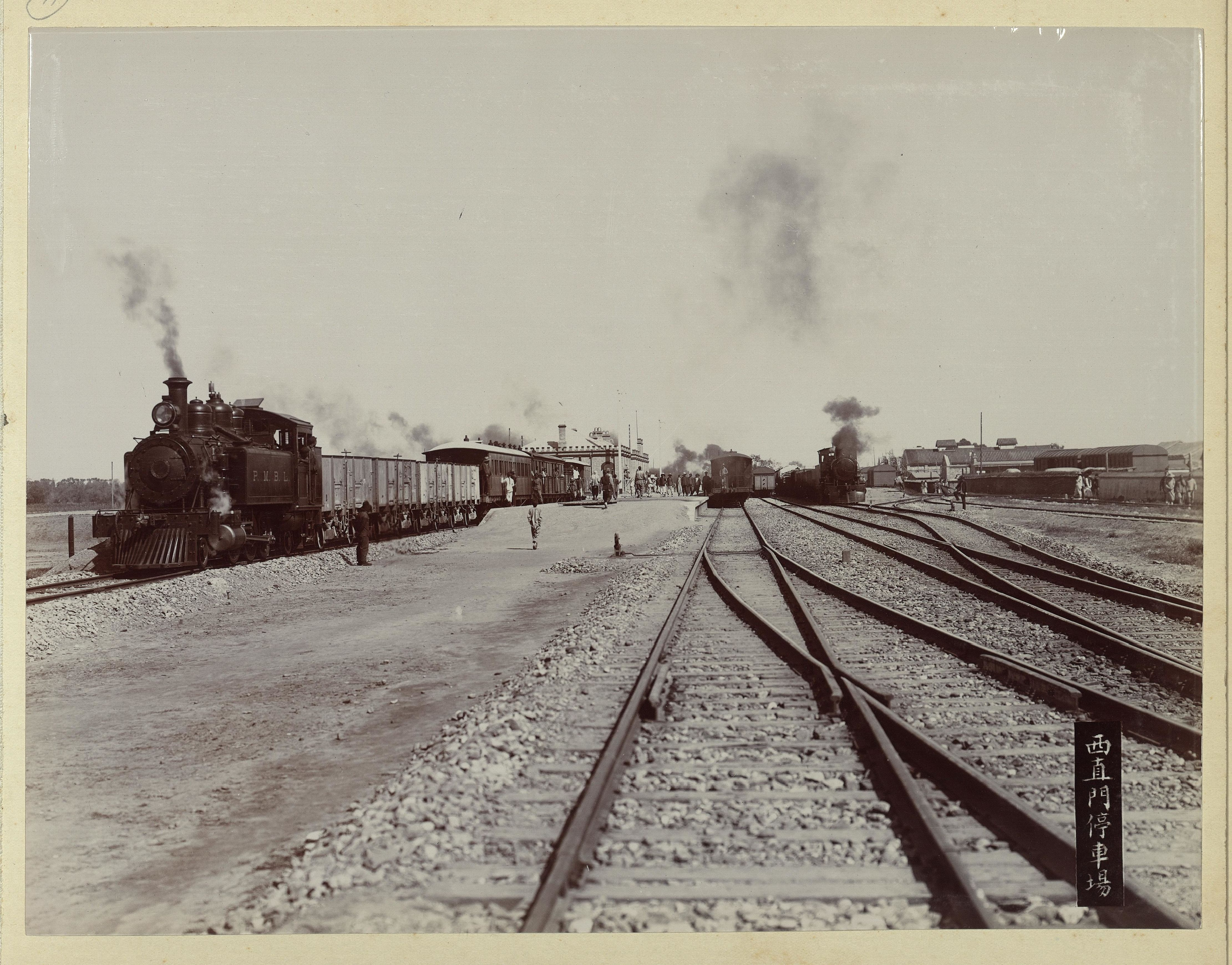 该图显示了位于西直门的铁路停车场，西直门是老北京其中的一座城门。从图上可见多条铁轨。